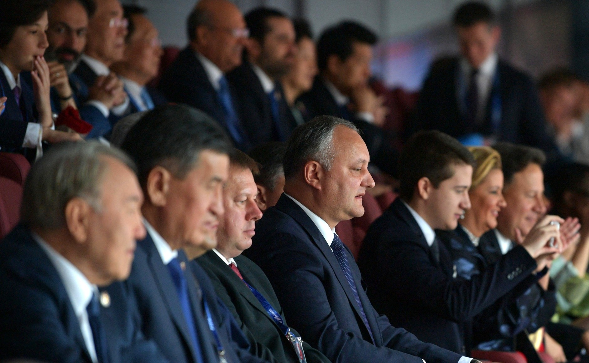 Церемония открытия чемпионата мира по футболу 2018 года. Президент Республики Молдова Игорь Додон на церемонии открытия чемпионата мира по футболу 2018 года